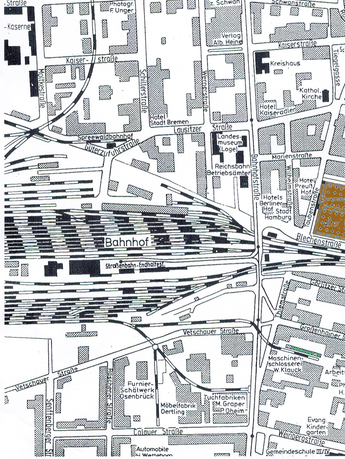 Stadtkarte 1938.1.3